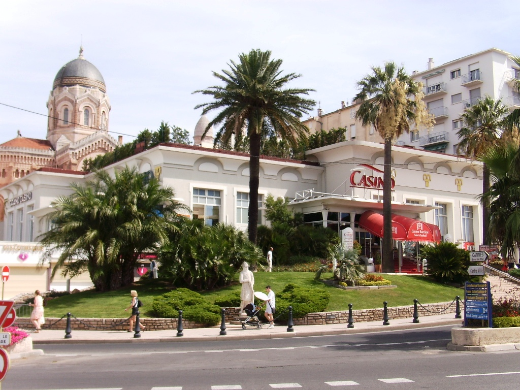 Casino Barrière de Saint-Raphaël (83)